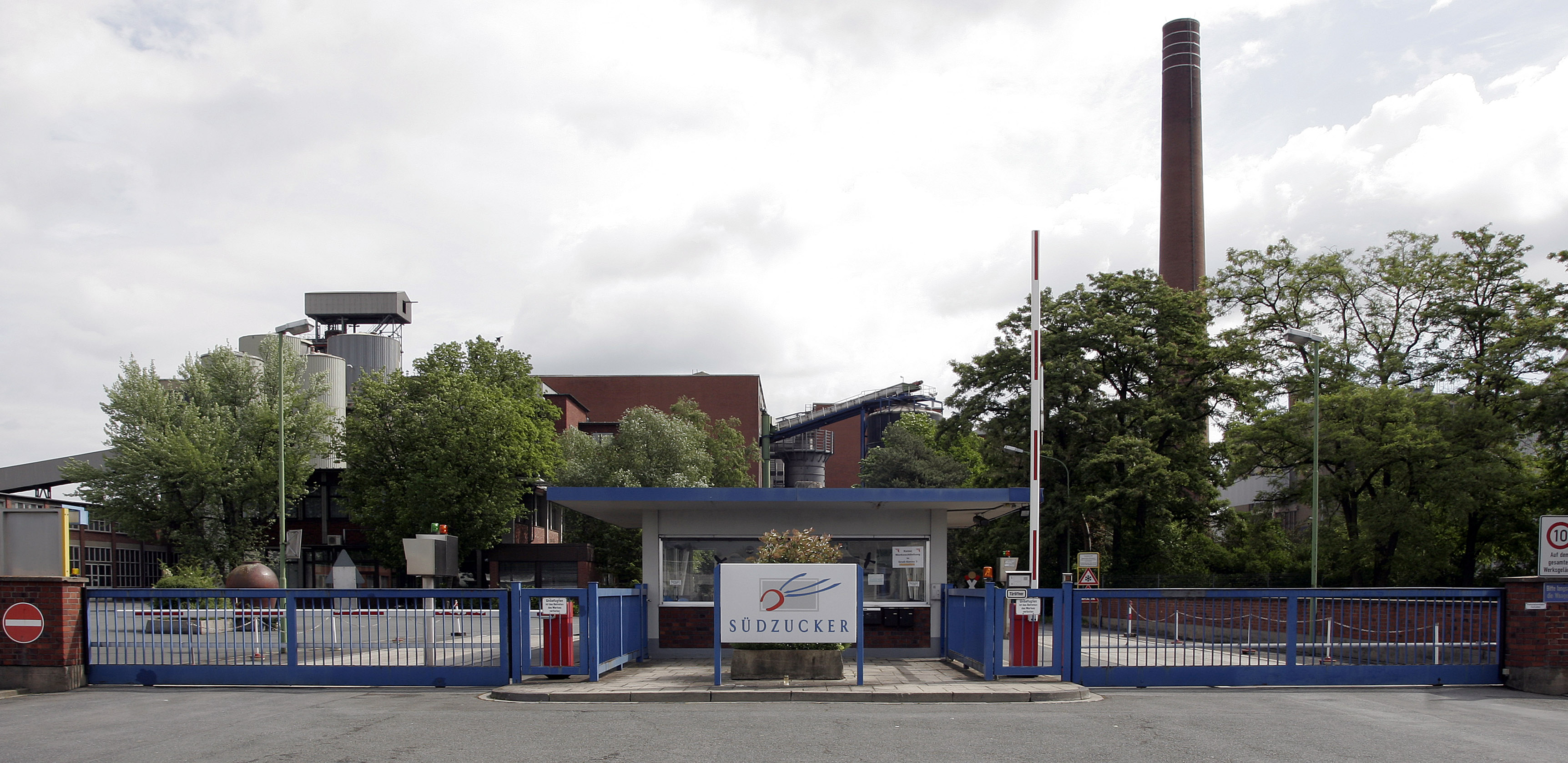 The Südzucker AG plant in Groß-Gerau, Hesse, Germany Das Werk der Südzucker AG in Groß-Gerau